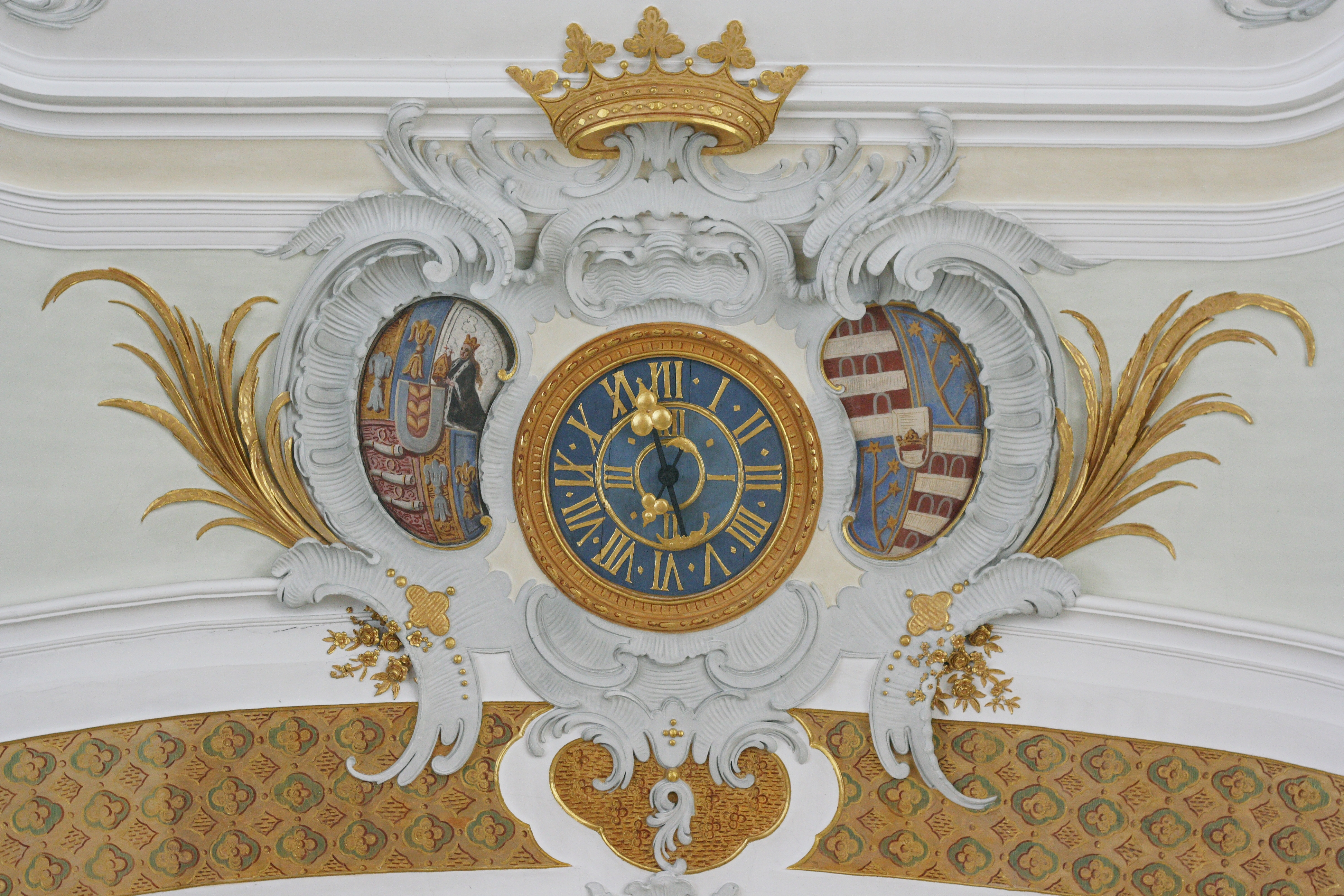 Katholische Pfarrkirche St. Nikolaus in Oberndorf am Lech, einer Gemeinde im Landkreis Donau-Ries (Bayern), Allianzwappen der Eheleute Fugger/Firmian: Sebastian Graf Fugger-Glött († 1763) und Elisabeth Gabriele von Firmian (1722—1782); in Stuckkartuschen um Uhr